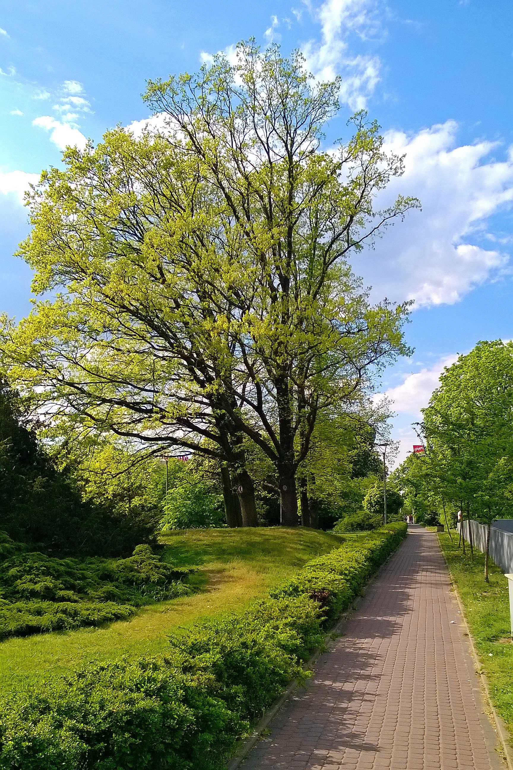 Część zielona „Jordanek” w Toruniu2